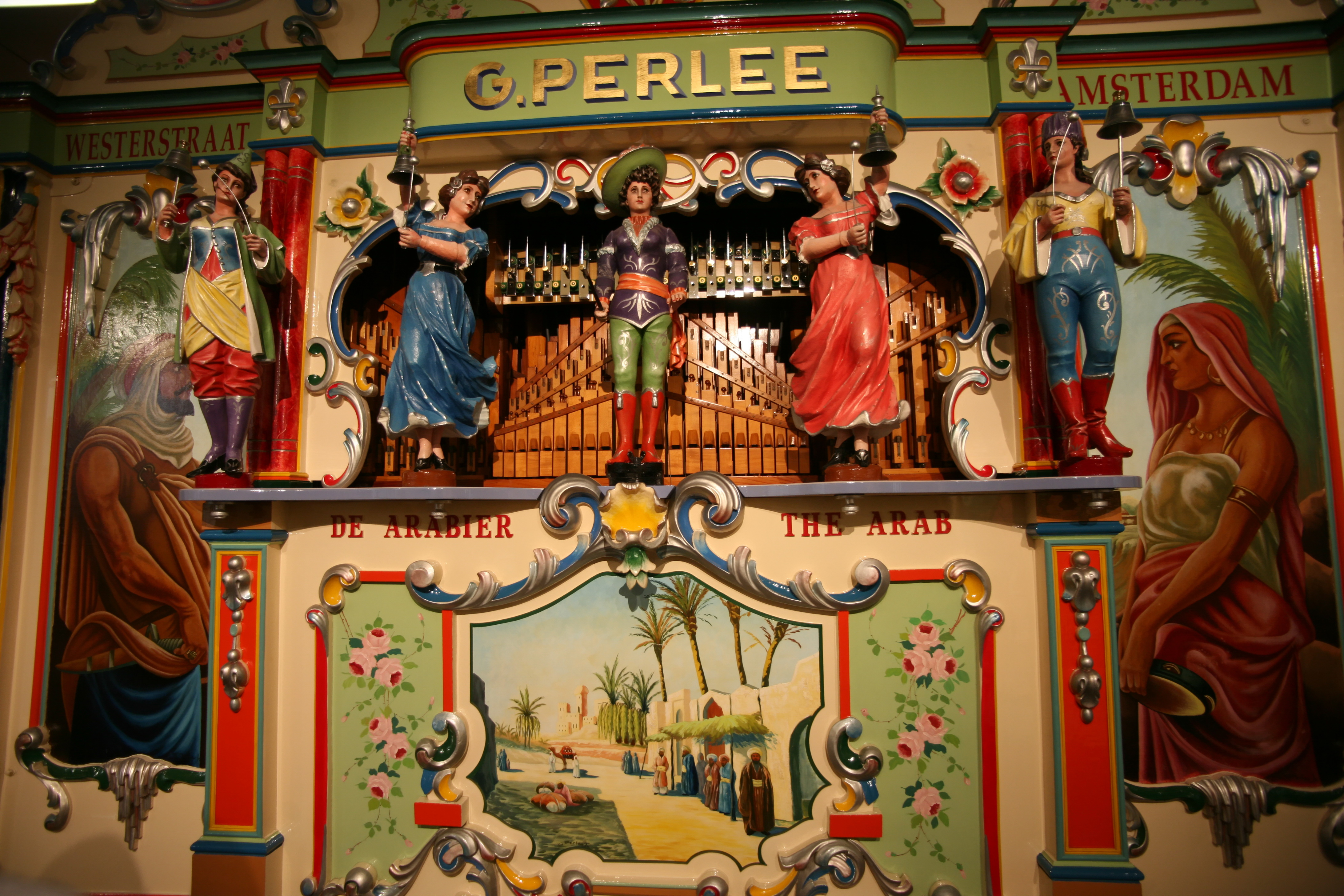 museum speelklok tot pierement (206)